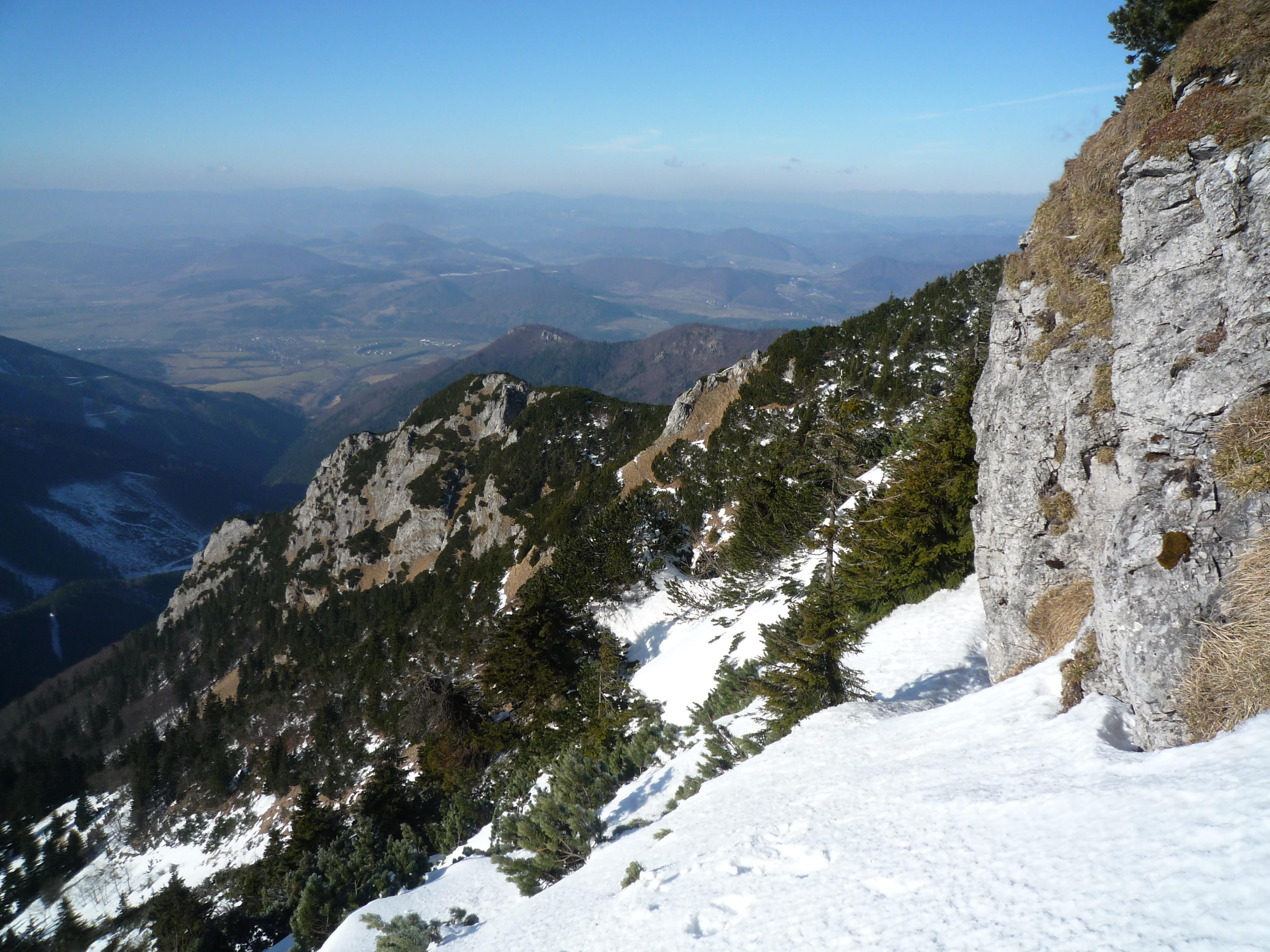 Skalnatý výbežok Stratenca. (Malá Fatra)